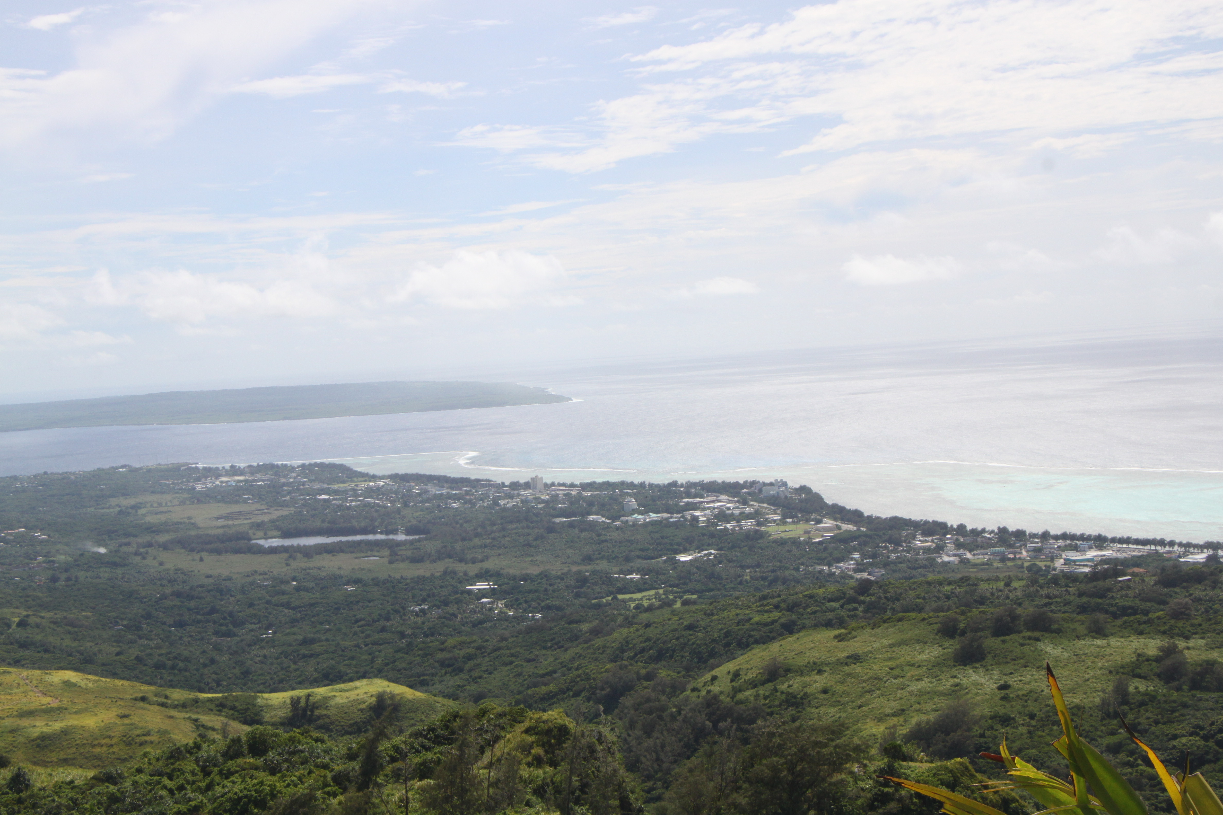 中文（中国大陆）: 图中近处为塞班岛，远处为天宁岛